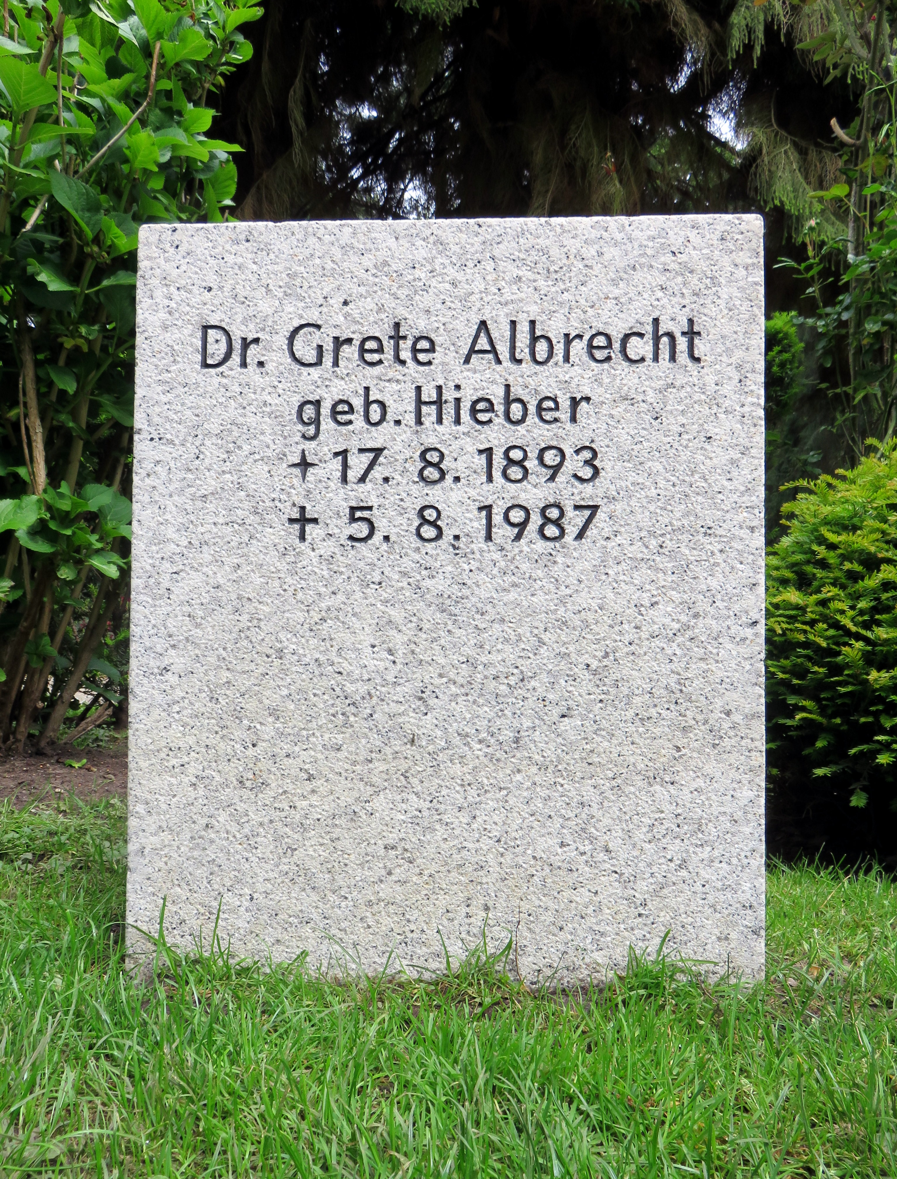 Historischer Kissenstein der deutschen Neurologin und Präsidentin des Deutschen Ärztinnenbundes GreteAlbrecht im Bereich des Gartens der Frauen auf dem Ohlsdorfer Friedhof in Hamburg-Ohlsdorf.